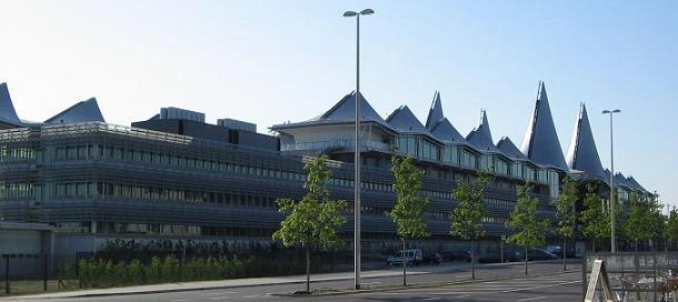 Het Antwerpse justitiepaleis.